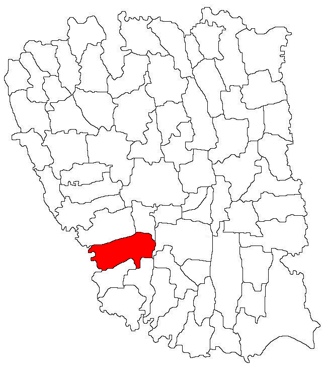 Categorie:Hărţi ale judeţului Galaţi